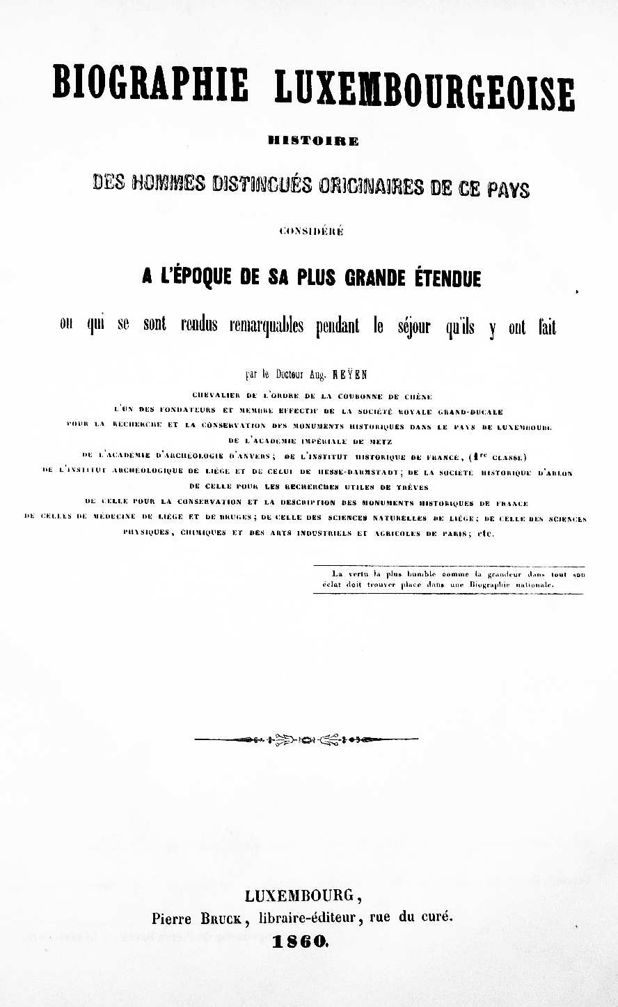 Banneschten Titel vum Auguste Neyen senger Biographie Luxembourgeoise. Histoire des hommes distingués originaires de ce pays considéré à l'époque de sa plus grande étendue ou qui se sont rendus remarquables pendant le séjour qu'ils y ont fait.